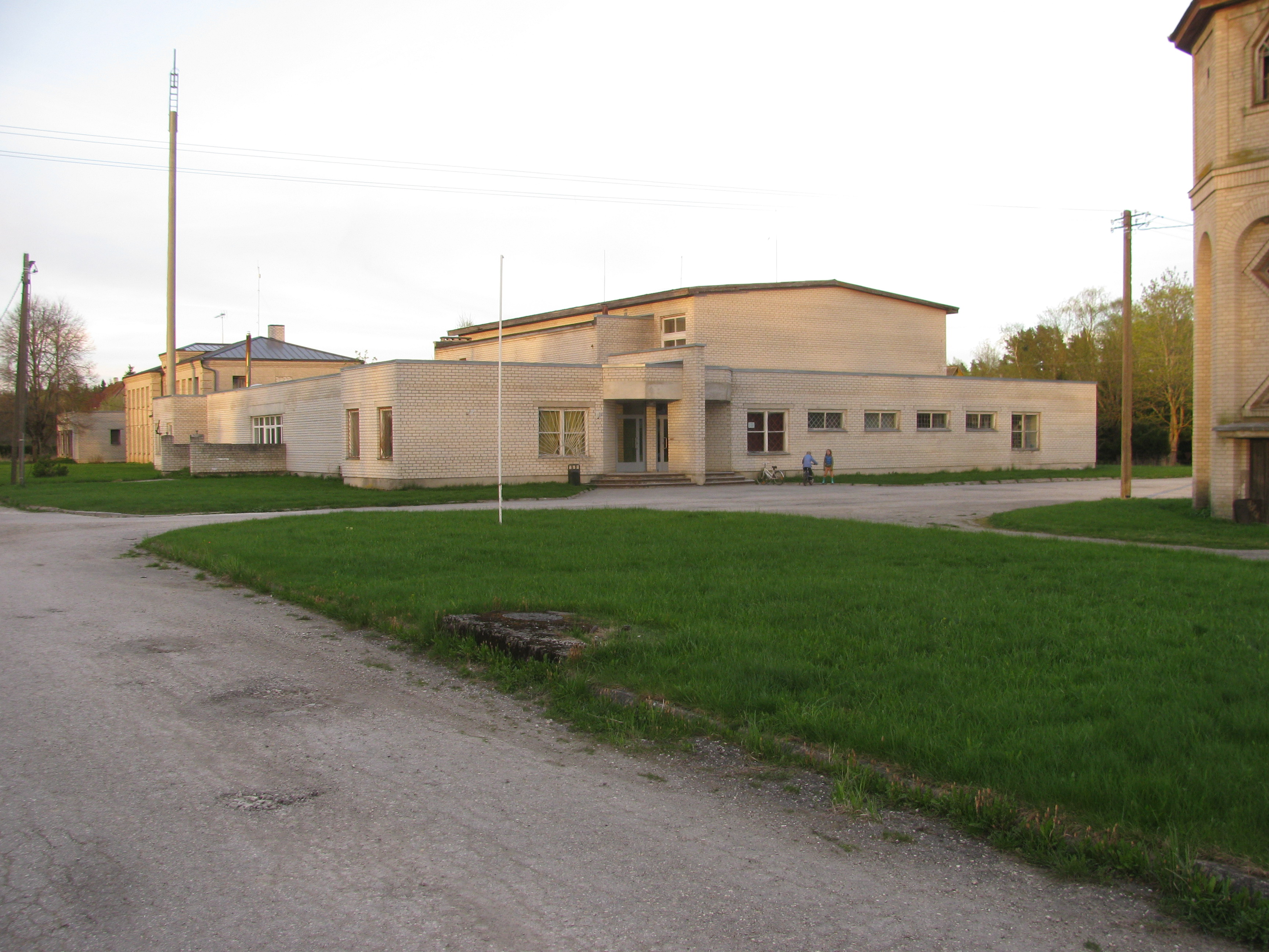 Vana-Vigala rahvamaja